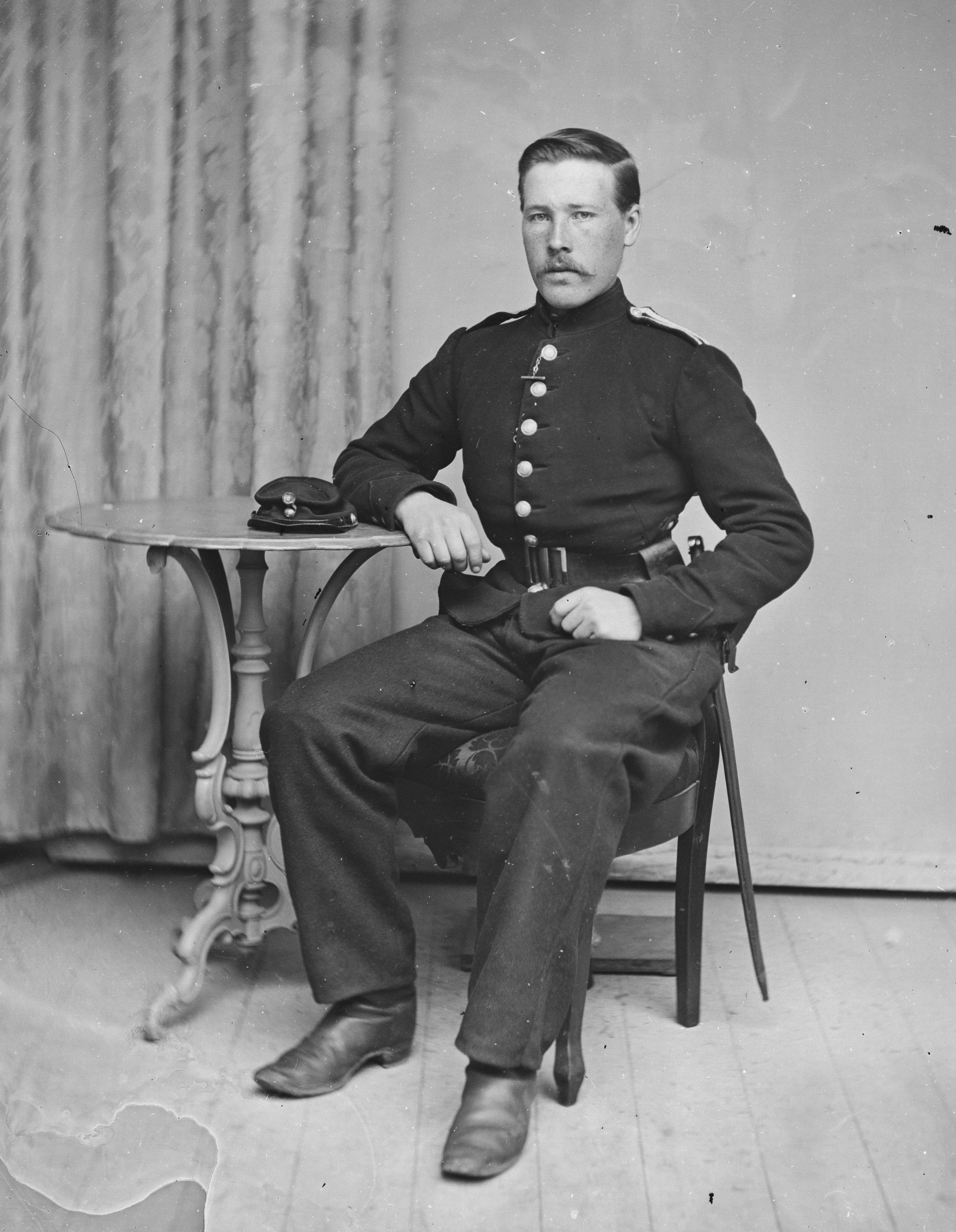 Nils Nilsen Pukstad (1846–1890), kommandersersjant, gårdbruker, stortingsmann og ordfører i Stadsbygd.